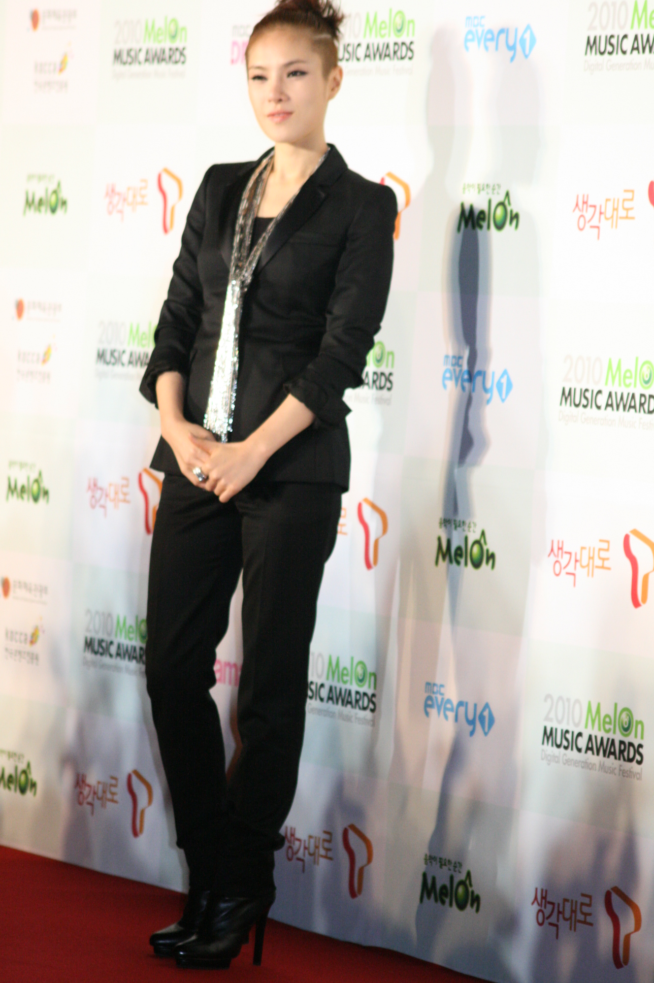 2010 멜론 뮤직 어워드